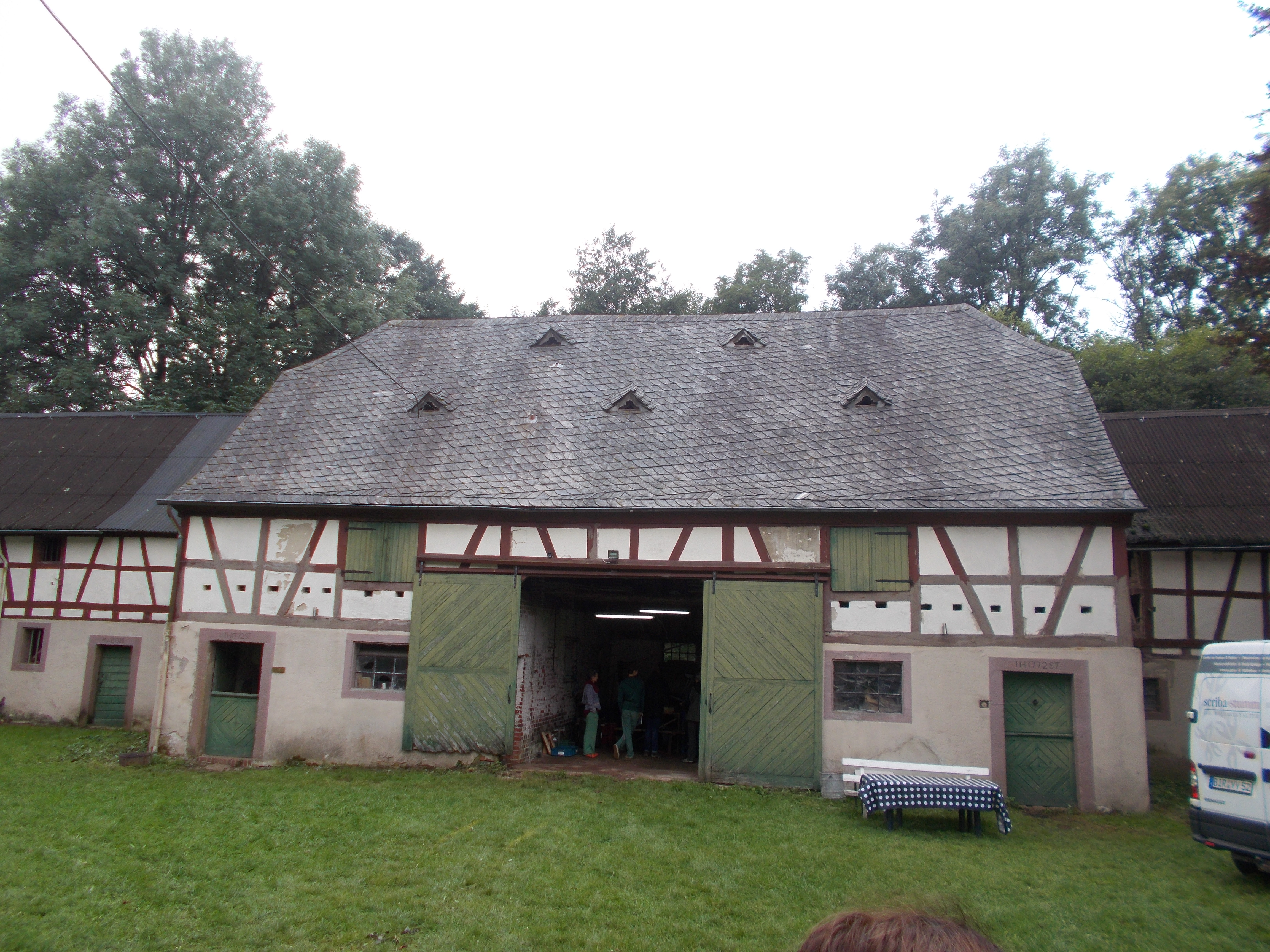 von Bruchsteinmauer umgebenes Gelände und Baulichkeiten der früheren Erzhütte Nr. 1: ehemaliges Kleinwarenlager (1771) Nr. 3: Herrenhaus; Mansarddachbau, Seitenrisalite (drittes Drittel des 18. Jahrhunderts) Nr. 3a: Verwaltungs- und Gästehaus; Stall- und Remisengebäude (ab 1772) Nr. 5: Wohn- und Produktionsbau Reste des eisernen oberschlächtigen Wasserrads (zweite Hälfte des 19. Jahrhunderts) gusseiserne Brücke (um 1800) Reste des Hochofens (Anfang des 19. Jahrhunderts) Lauf des Traunbachs, Weiher, Landschaftsgarten